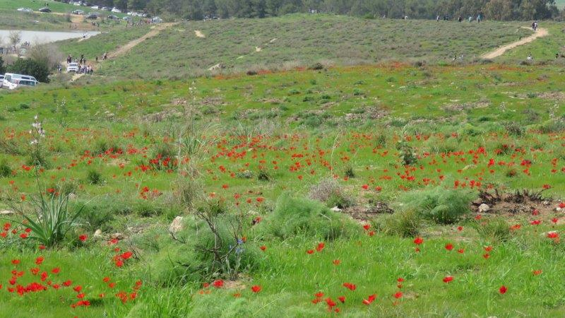 Pura Nature Reserve in the north Negev.